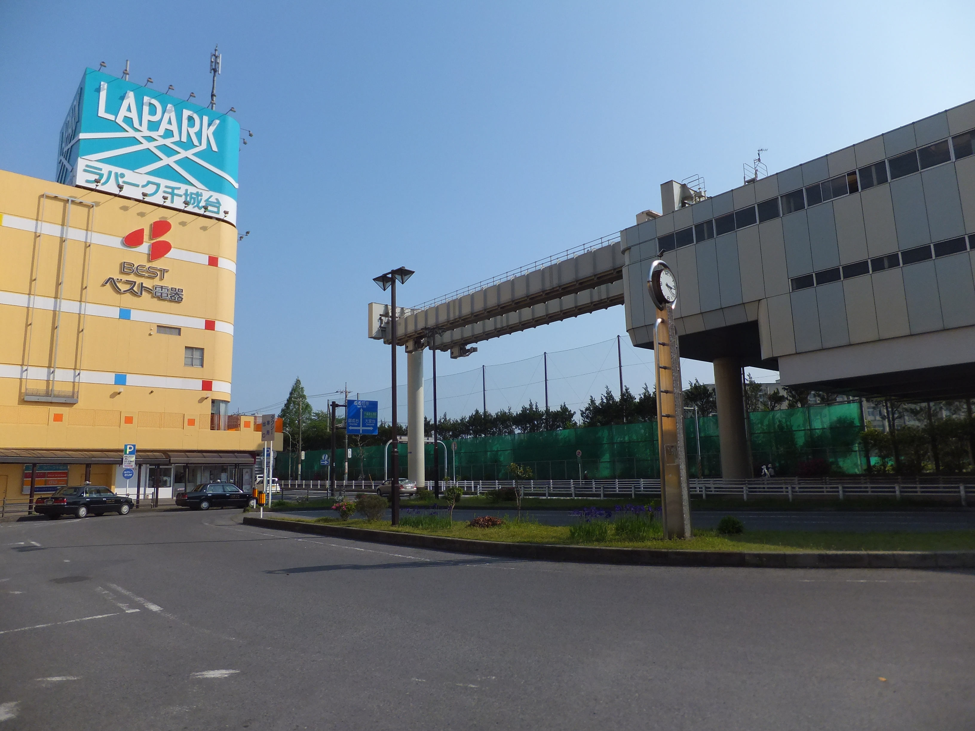 千葉都市モノレール千城台駅前ロータリーとモノレール終端